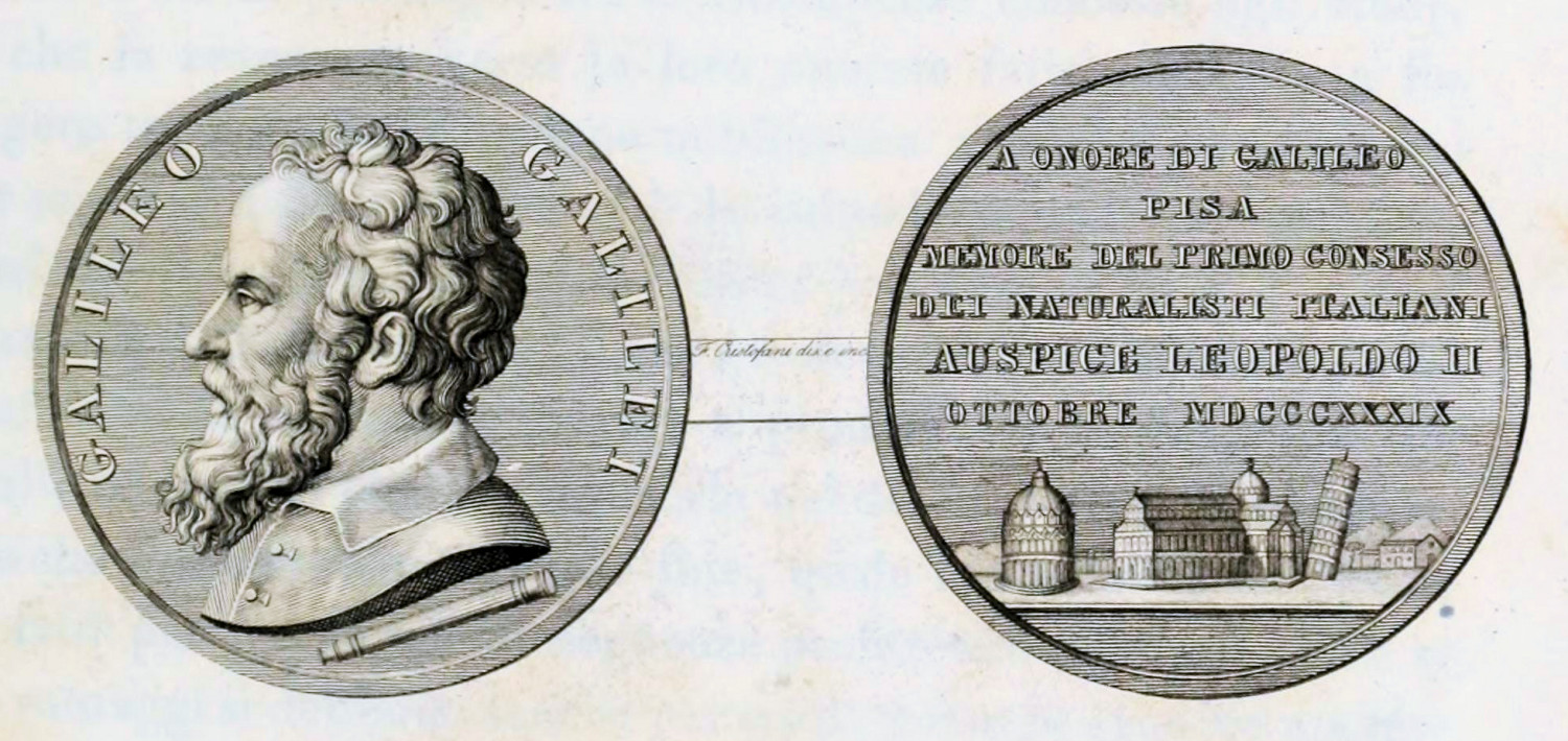 Medaglia per la prima riunione degli scienziati italiani